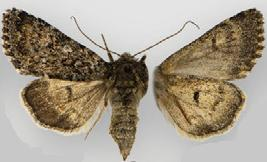 Lasionycta sasquatch female